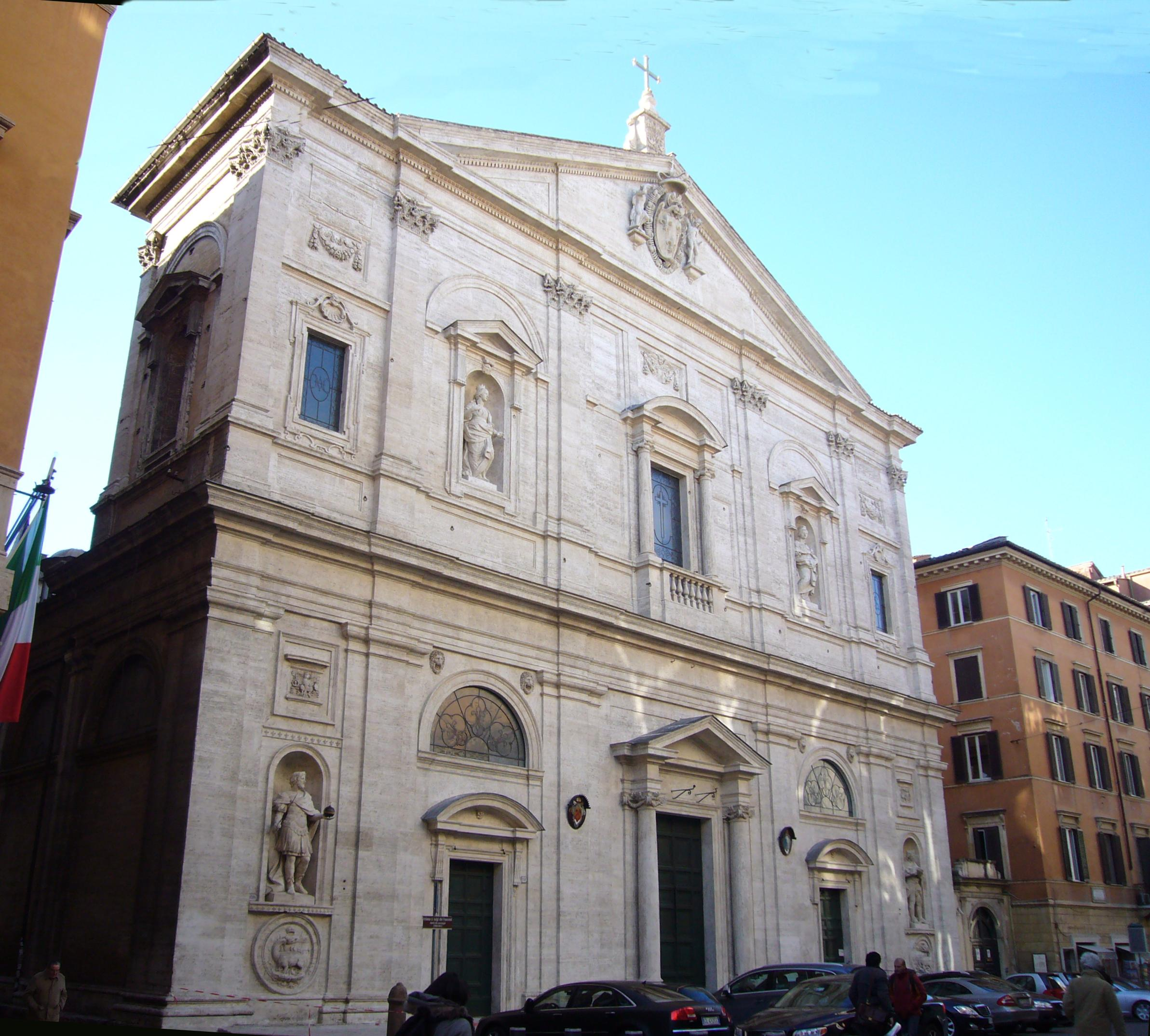 Roma, san Luigi dei Francesi: facciata restaurata